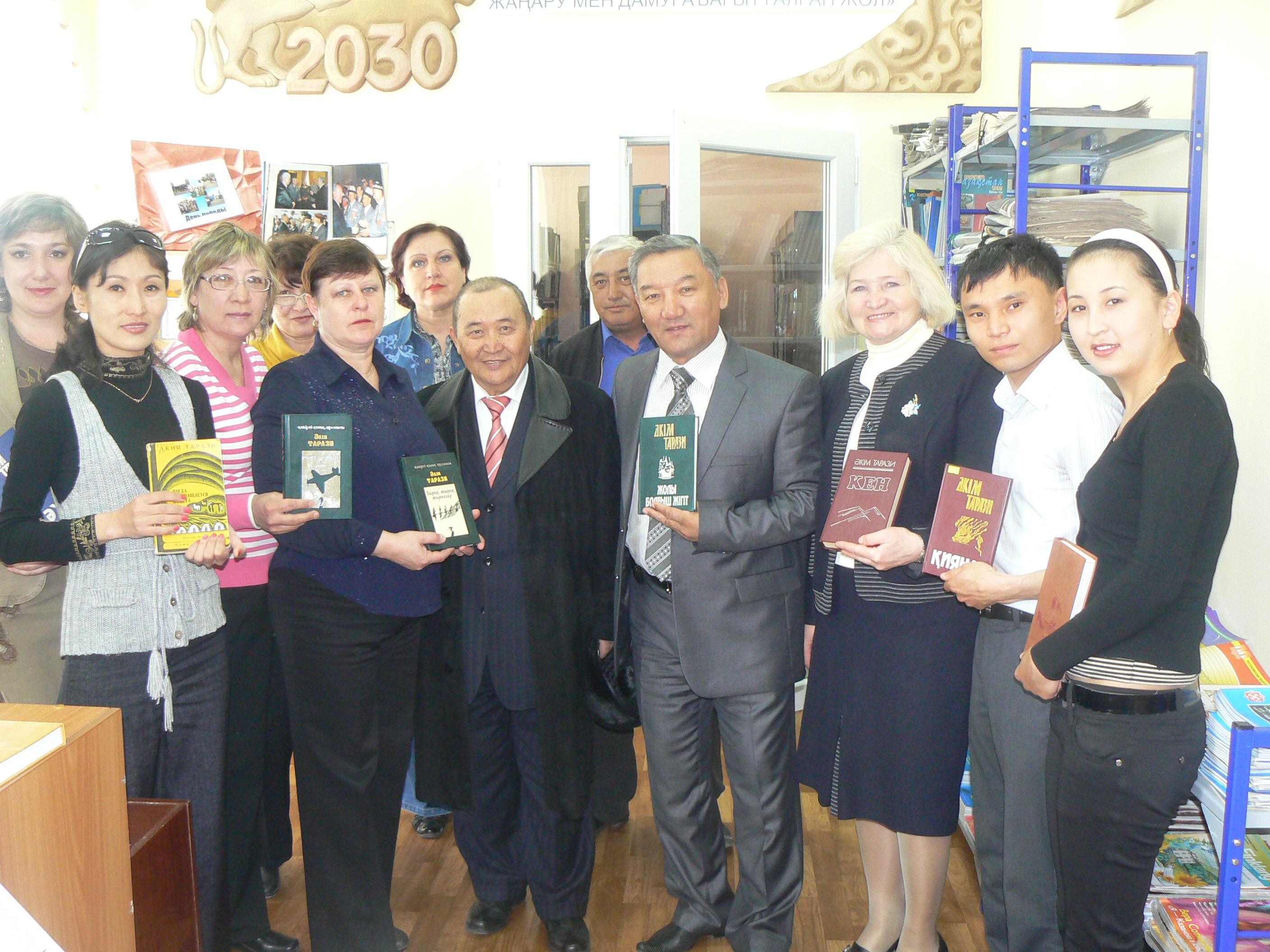 Встреча с писателем Аким Тарази